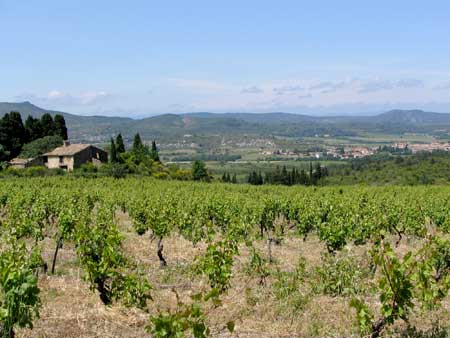 Vignoble du Mont-Alaric